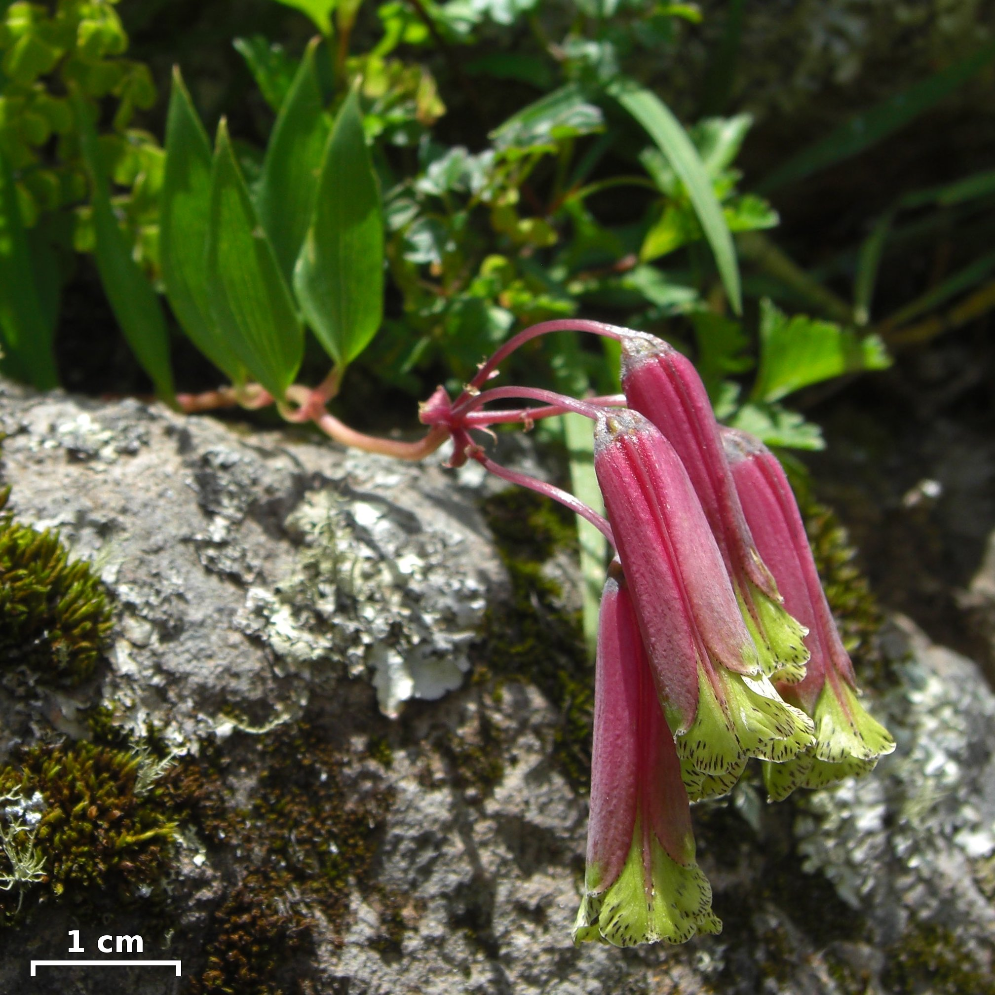 Tipón, Peru, 20130124